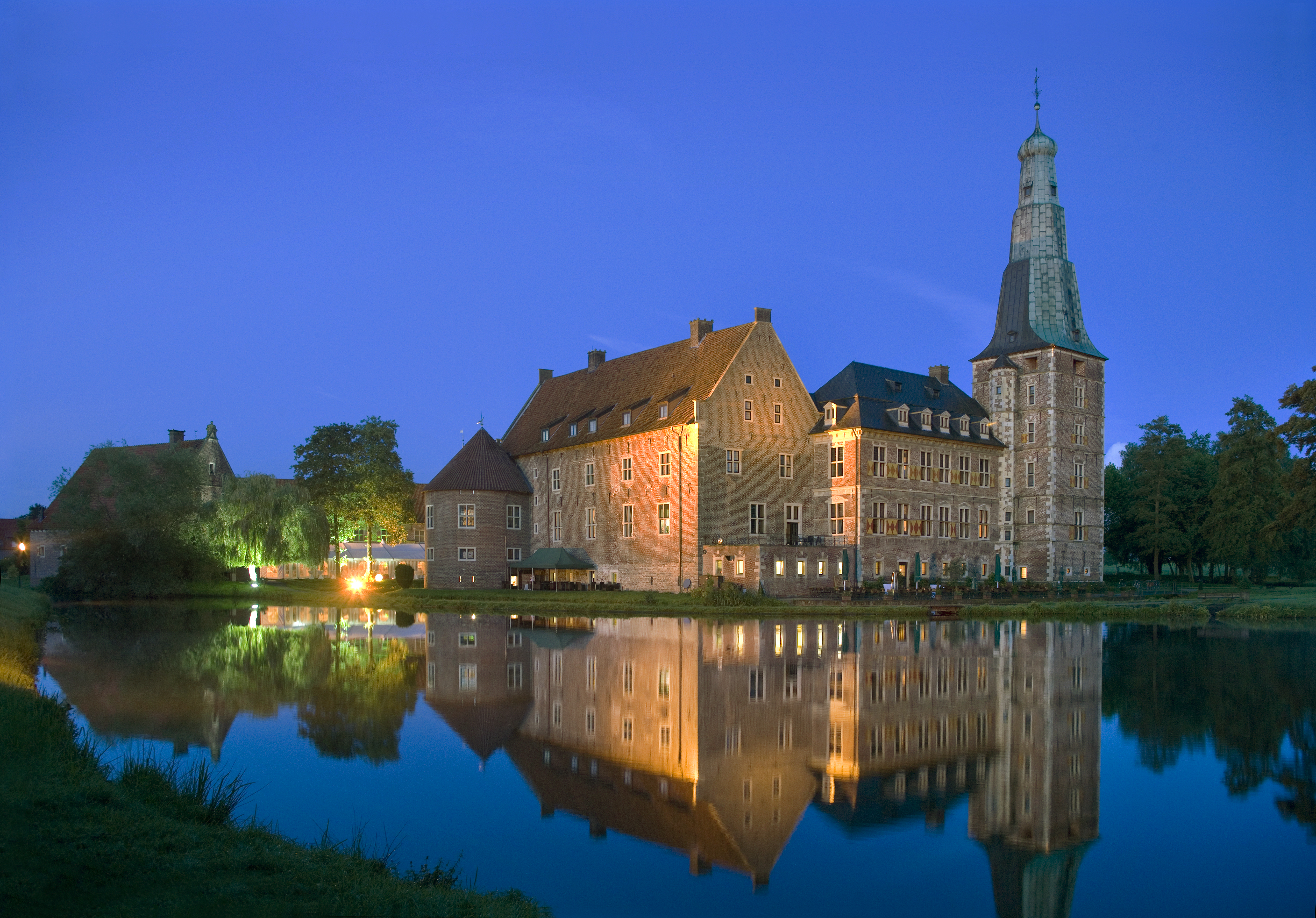 Das imposante Wasserschloss Raesfeld, ein Bauwerk des Reichsgrafen Alexander II. von Velen, Freiherr zu Raesfeld (1599-1675) in seiner ganzen Pracht und Herrlichkeit. Raesfeld, eine Gemeinde im Münsterland und Teil des Naturparks "Hohe Mark".